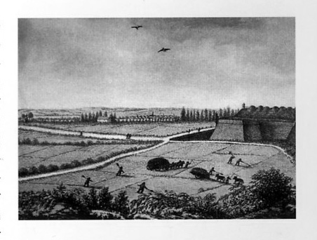 Kölner Stadtbefestigung. Vorgelände der Bastion des Eigelsteintores. Tuschzeichnung von Laporterie aus dem 18. Jahrhundert